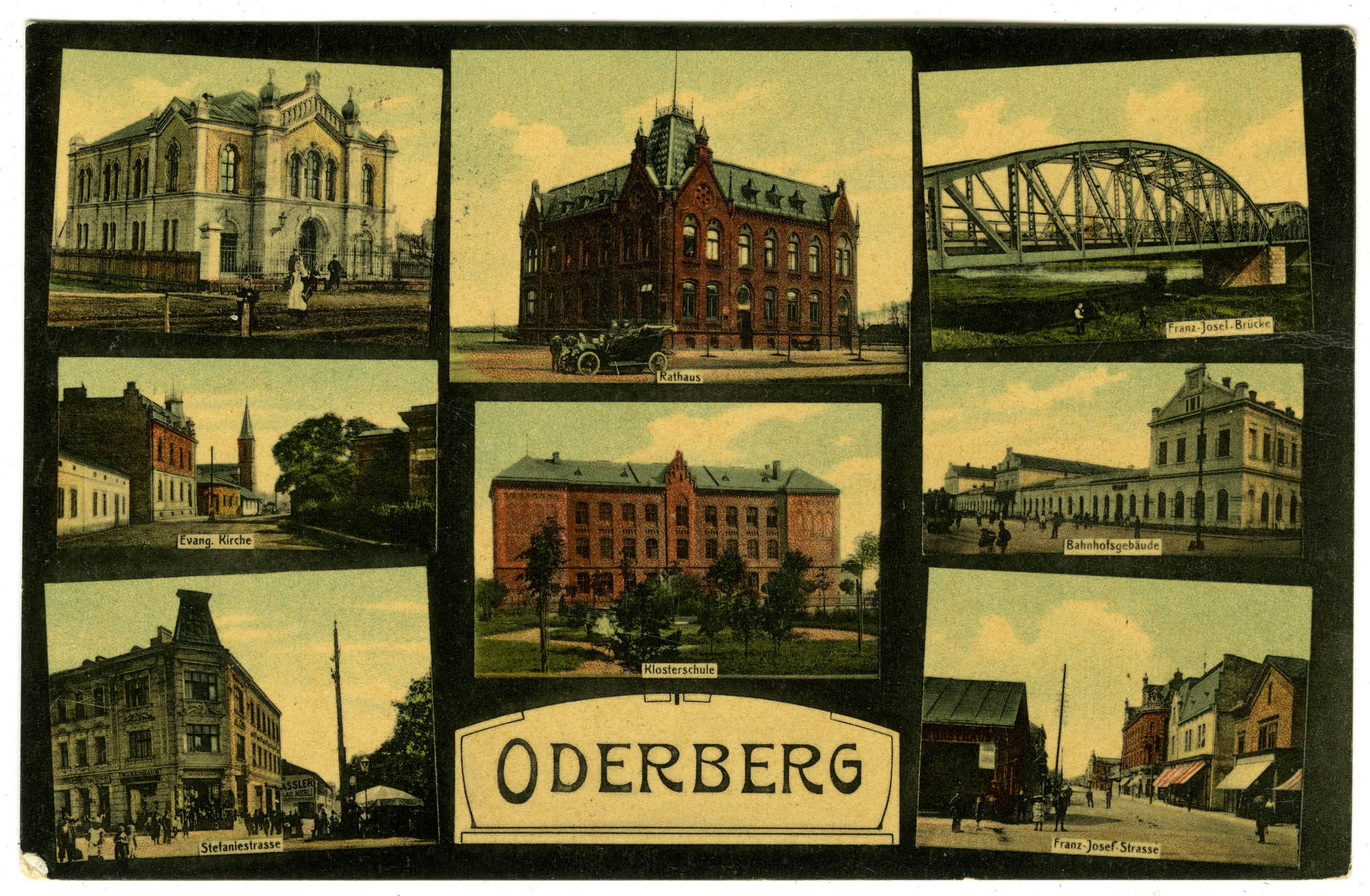 Bohumín, pohlednice z roku 1909